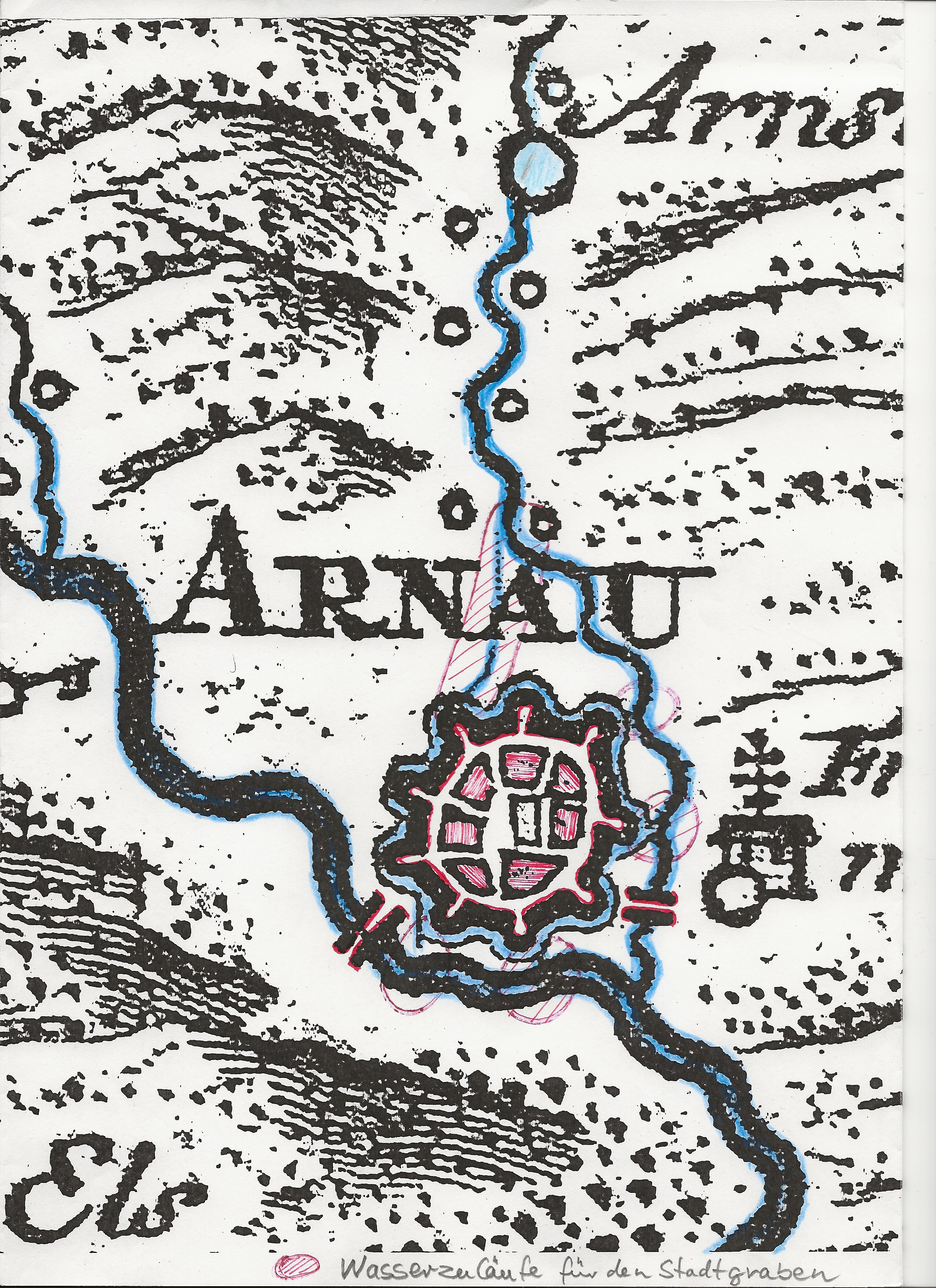 Darstellung der Stadt Arnau / Hostinne mit Wassergräben in einer Müllerischen Karte von ca. 1720